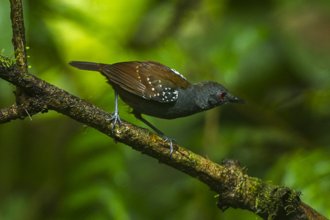 Dull-mantled Antbird - Braulio Carrillo - Costa Rica